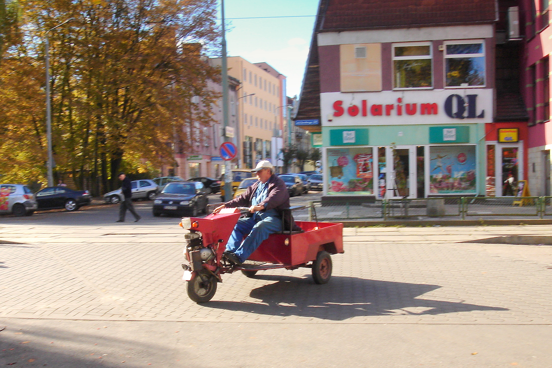 Gorzów Wlkp., trójkołowiec ( trajka ) na skrzyżowaniu ul. Chrobrego z Łokietka.